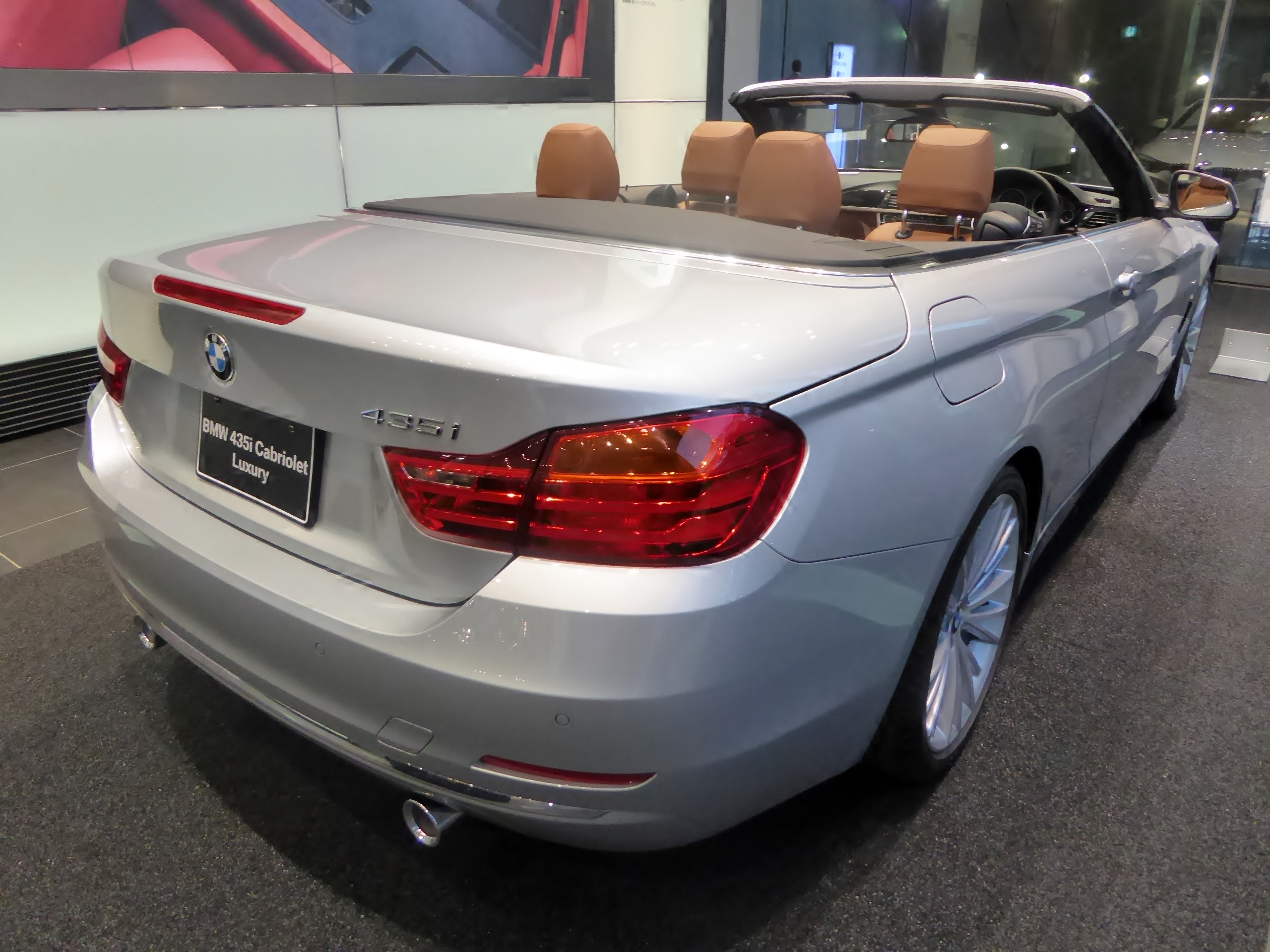 F33型BMW・435iカブリオレラグジュアリーをリアから撮影。